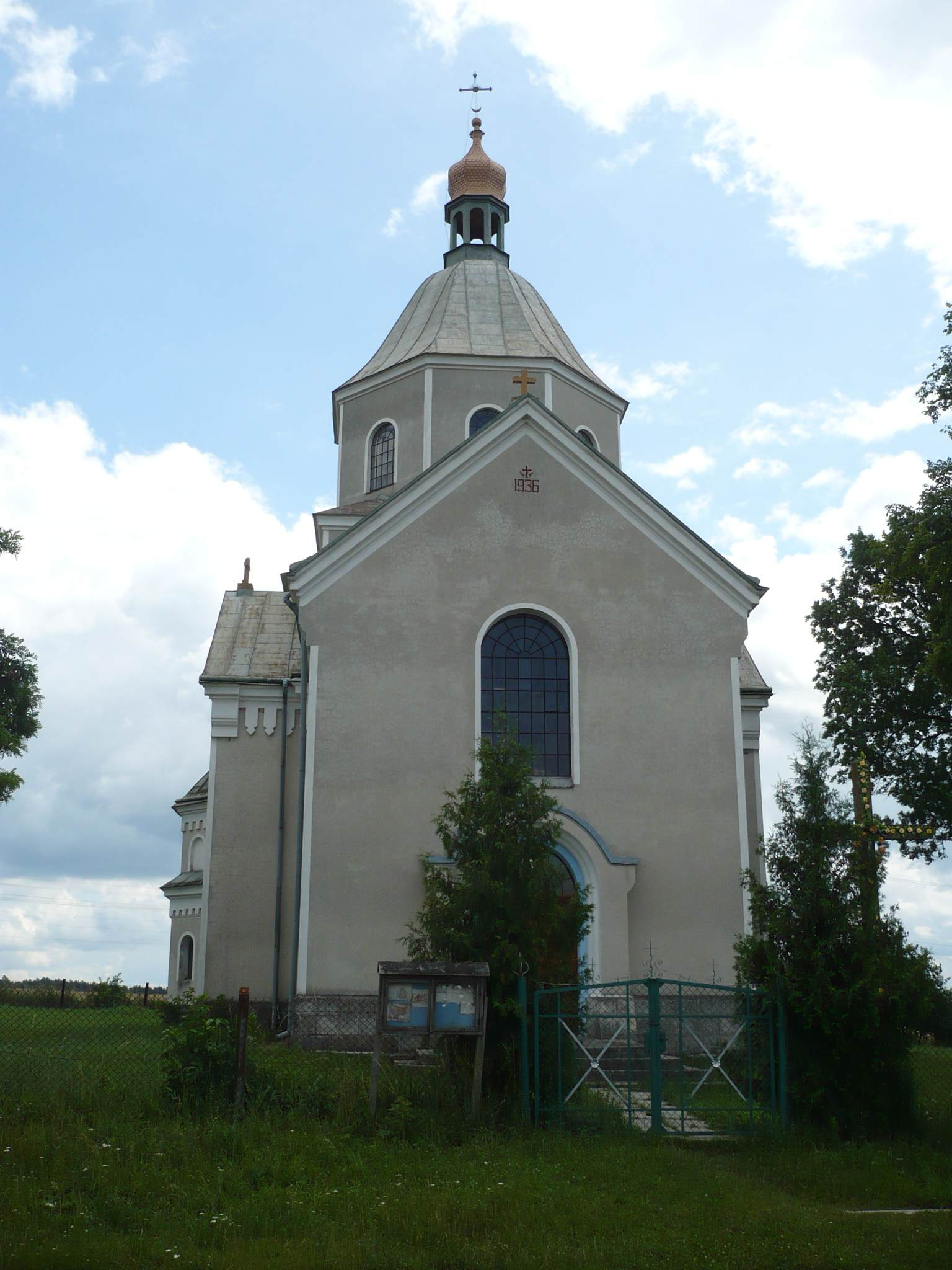 село Черемошня, церква